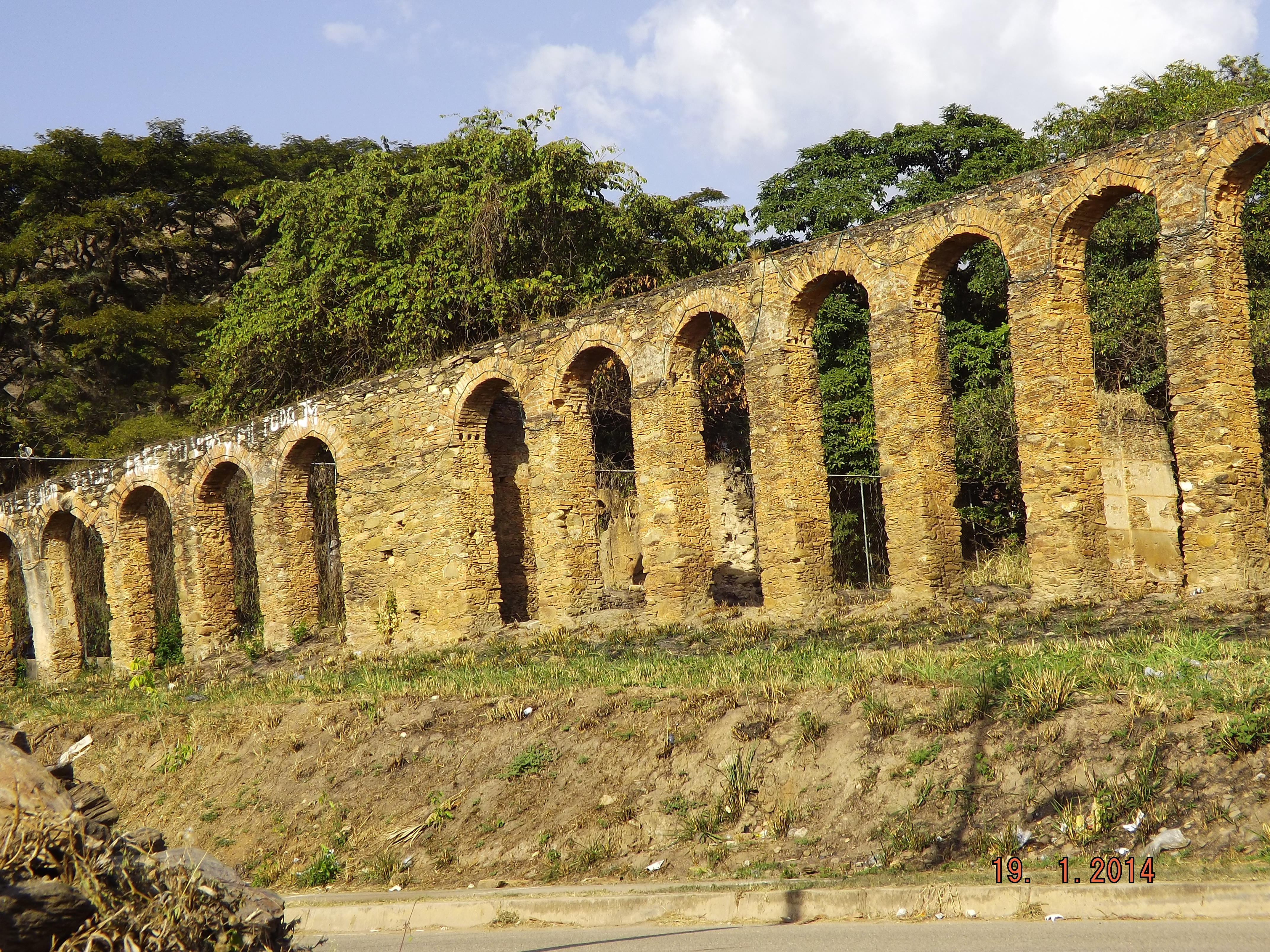 Arcada del acueducto y trapiche de Tiquire de Flores se remonta al siglo XVII. Acceso por la carretera nacional hacia La Victoria e igual a la población de El Consejo, en Paso Real de Tiquire Flores. Desde allí se puede apreciar un conjunto de arcadas del acueducto colonial, considerada la obra de ingeniería hidráulica del Valle de Aragua y de la Provincia de Caracas. Construido de piedra, ladrillo y mampostería, producidos todos con materiales cuyas fuentes se encuentran en los alrededores del lugar. También se puede apreciar en el lugar el Trapiche de caña de Tiquire Flores, hasta donde llegan los 32 arcos que convergen en fila inclinada